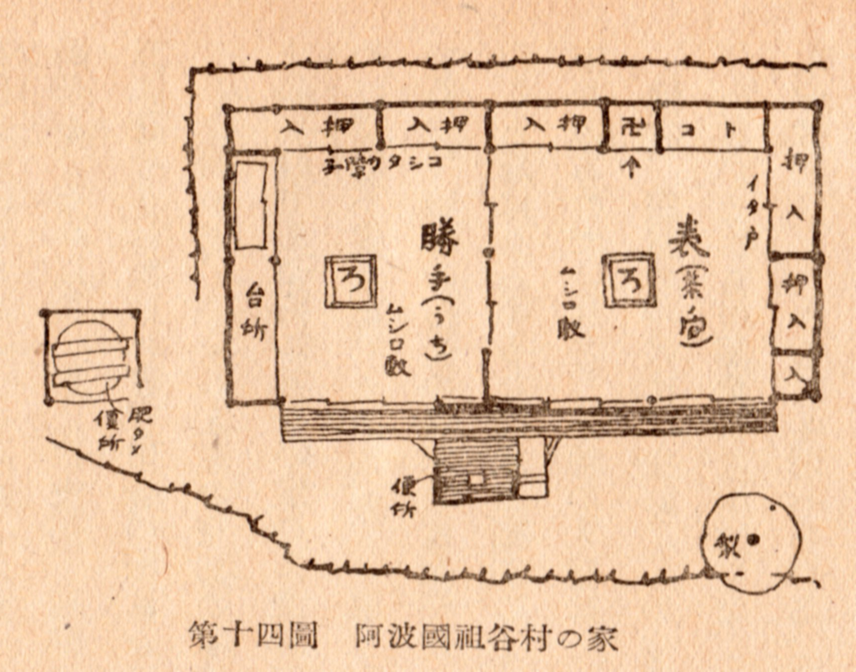 今和次郎『改稿 日本の民家』（1943年刊・相模書房）の中にある間取り図。平家の落人が建てたと思われる寝殿造の一例。